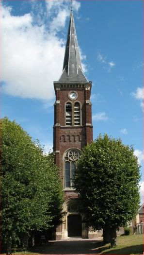 Eglise de style néo-gothique, construite au XIXe siècle.